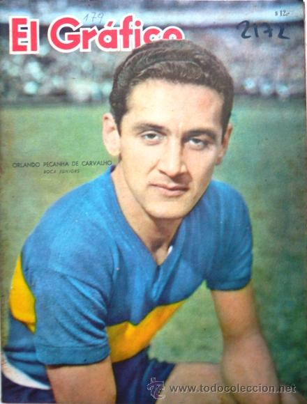 Orlando Peçanha Carvalho, futebolista brasileiro, no uniforme do CA Boca Juniors.